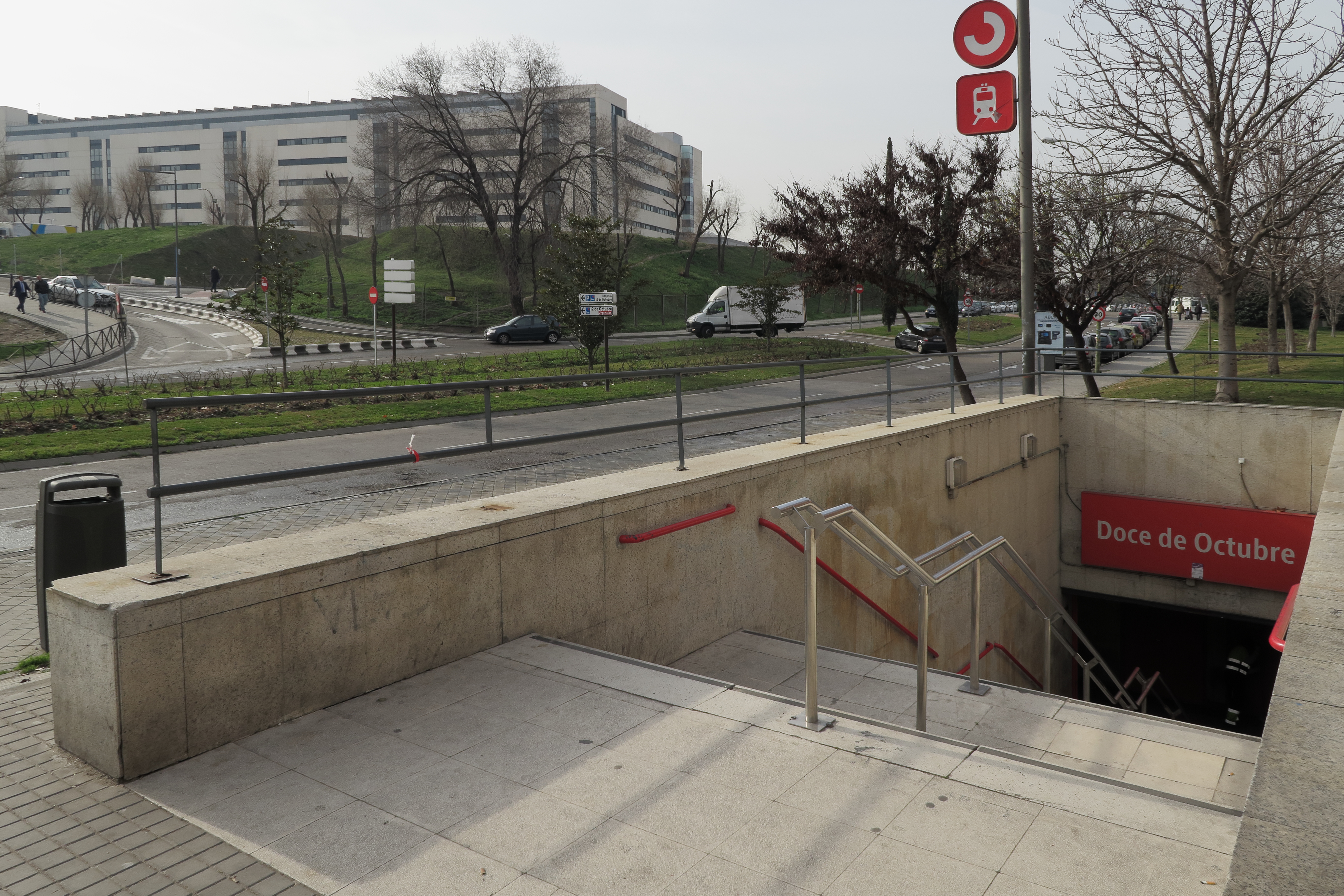 Entrada estación 12 de Octubre, al fondo nuevo edificio del Hospital 12 de Octubre